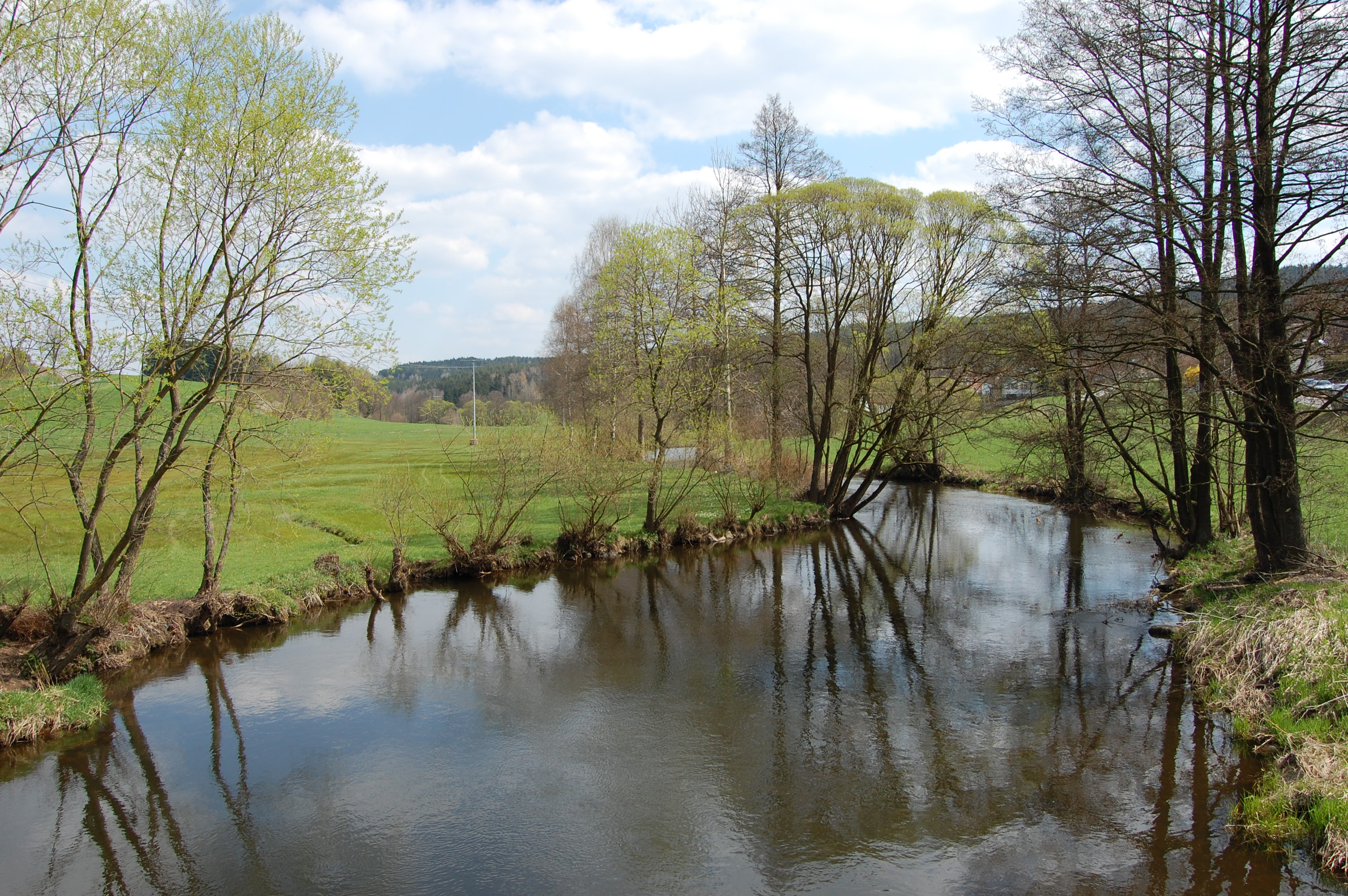 Böhmischbruck, Fluss Pfreimd bei Böhmischbruck (2011)